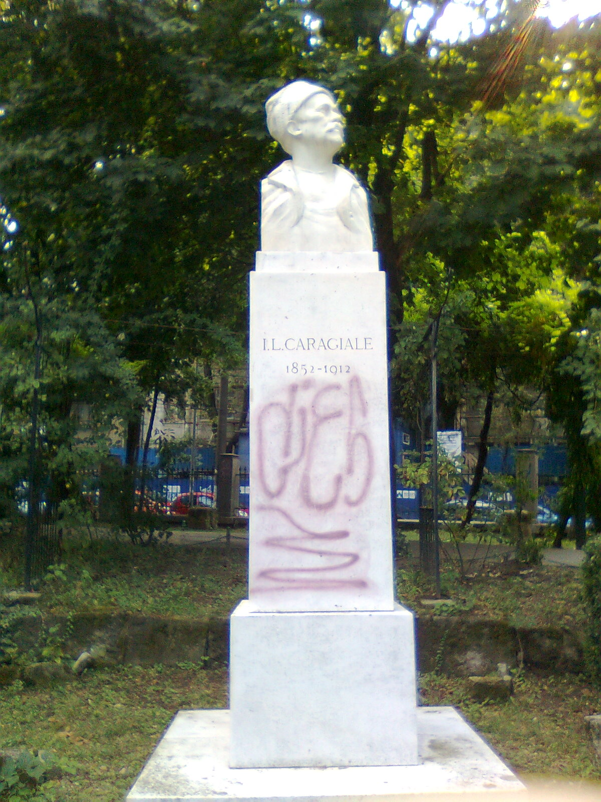 Bustul lui I. L. Caragiale